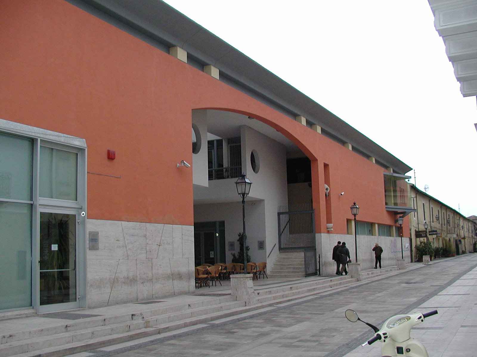 Das Museum di Abruzzo in der Altstadt